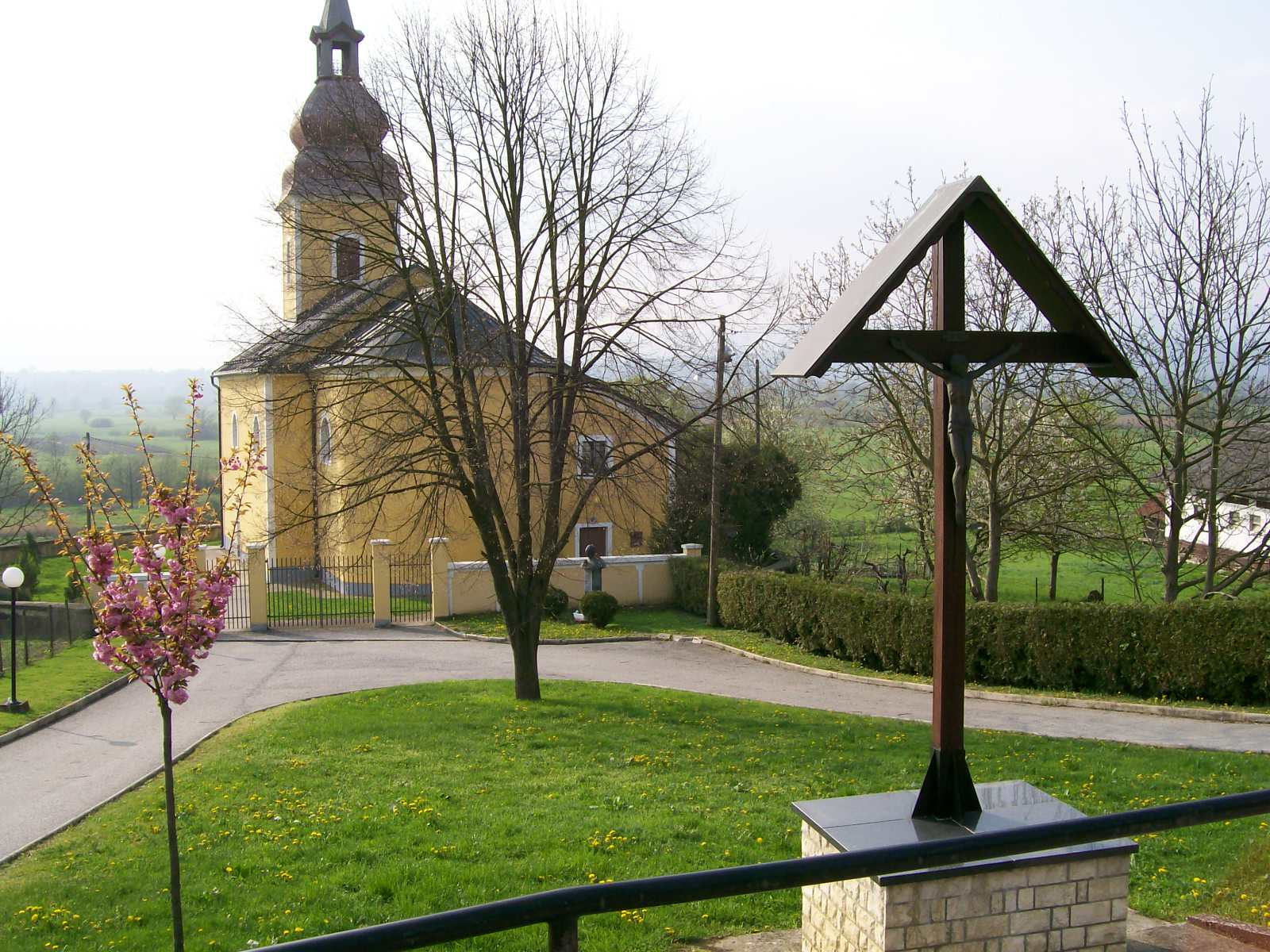 Župna crkva sv. Ane u Rozgi, Općina Dubravica, Zagrebačka županija